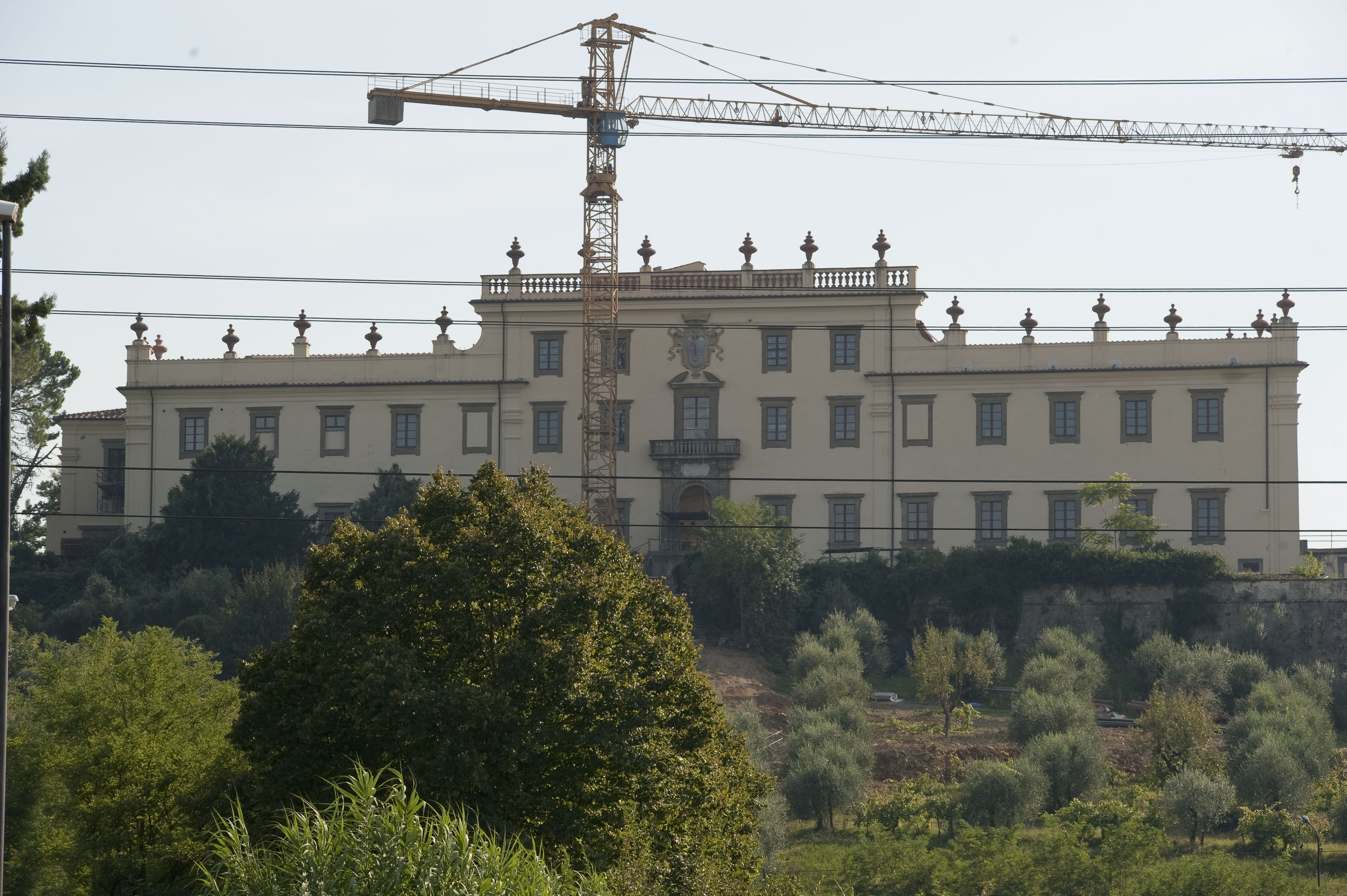 Villa di Castel Pulci (Scandicci)